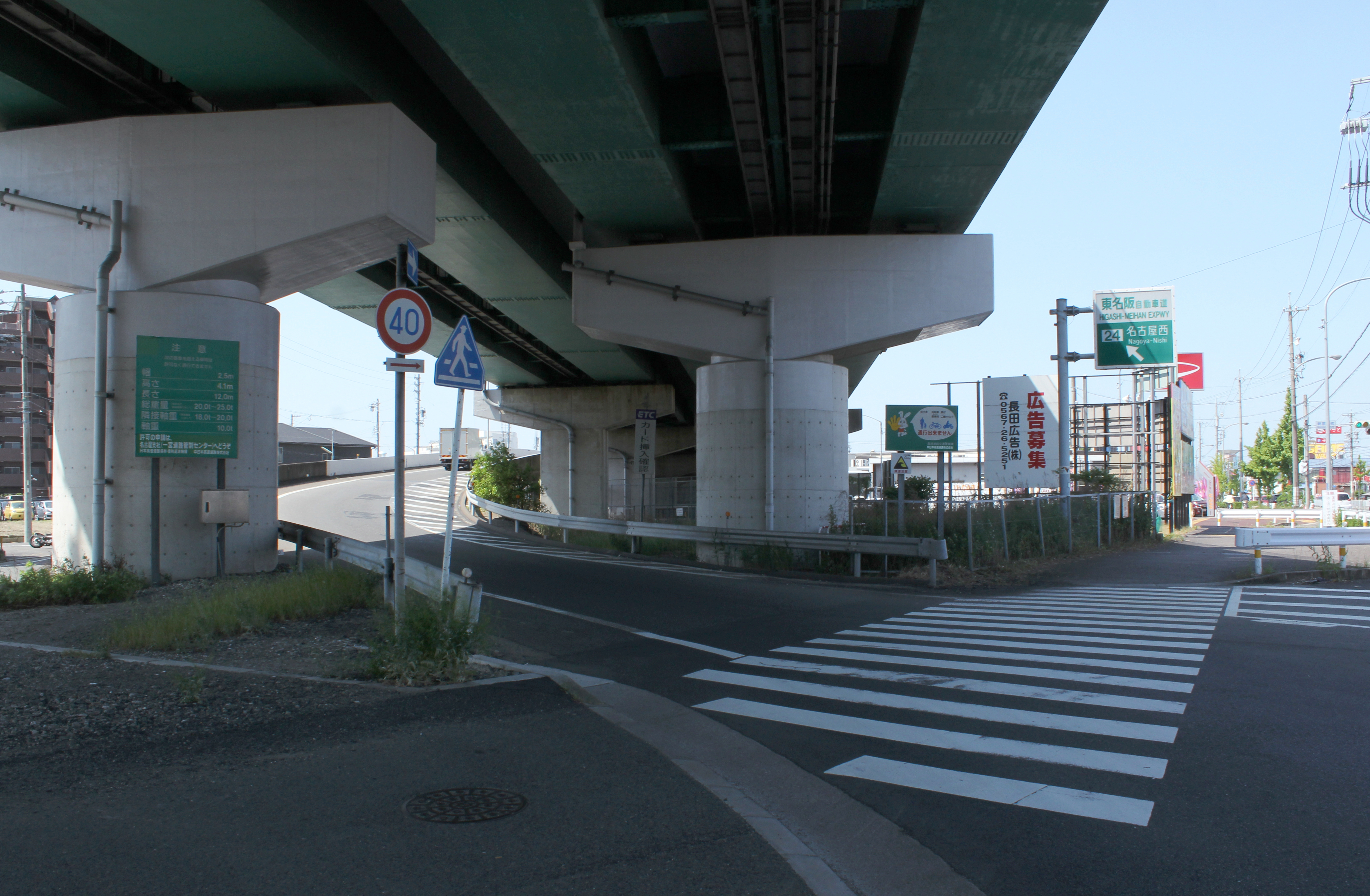 東名阪自動車道 名古屋西IC入口